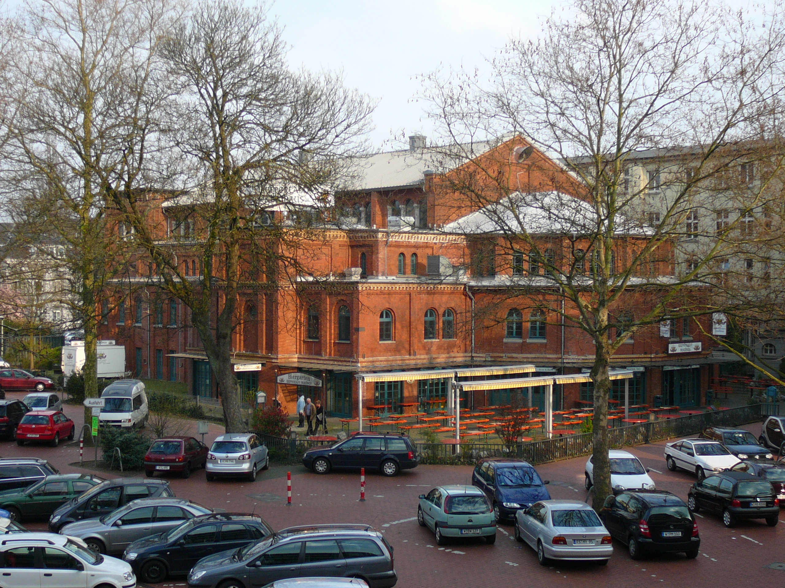 Kleine Flurstraße, Wuppertal-Barmen